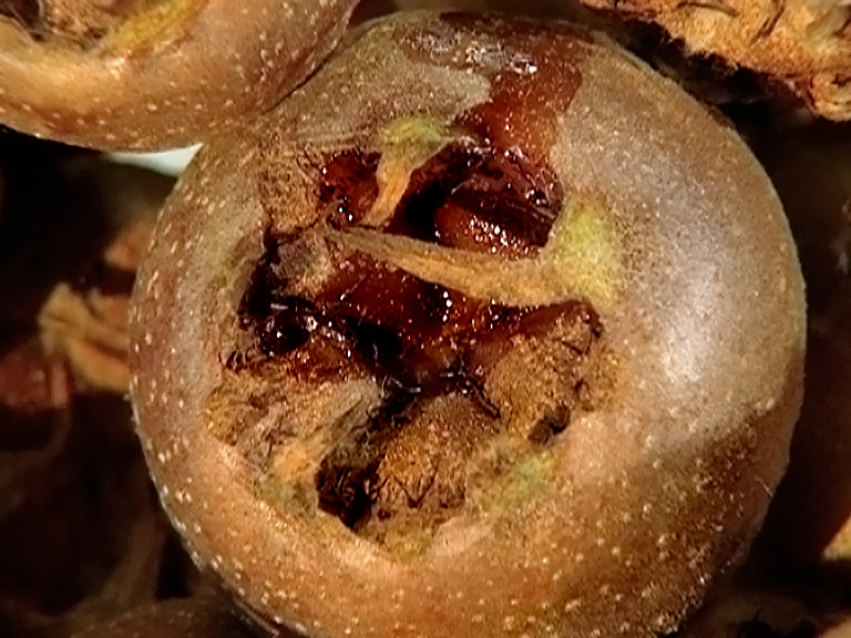 Essreife Frucht